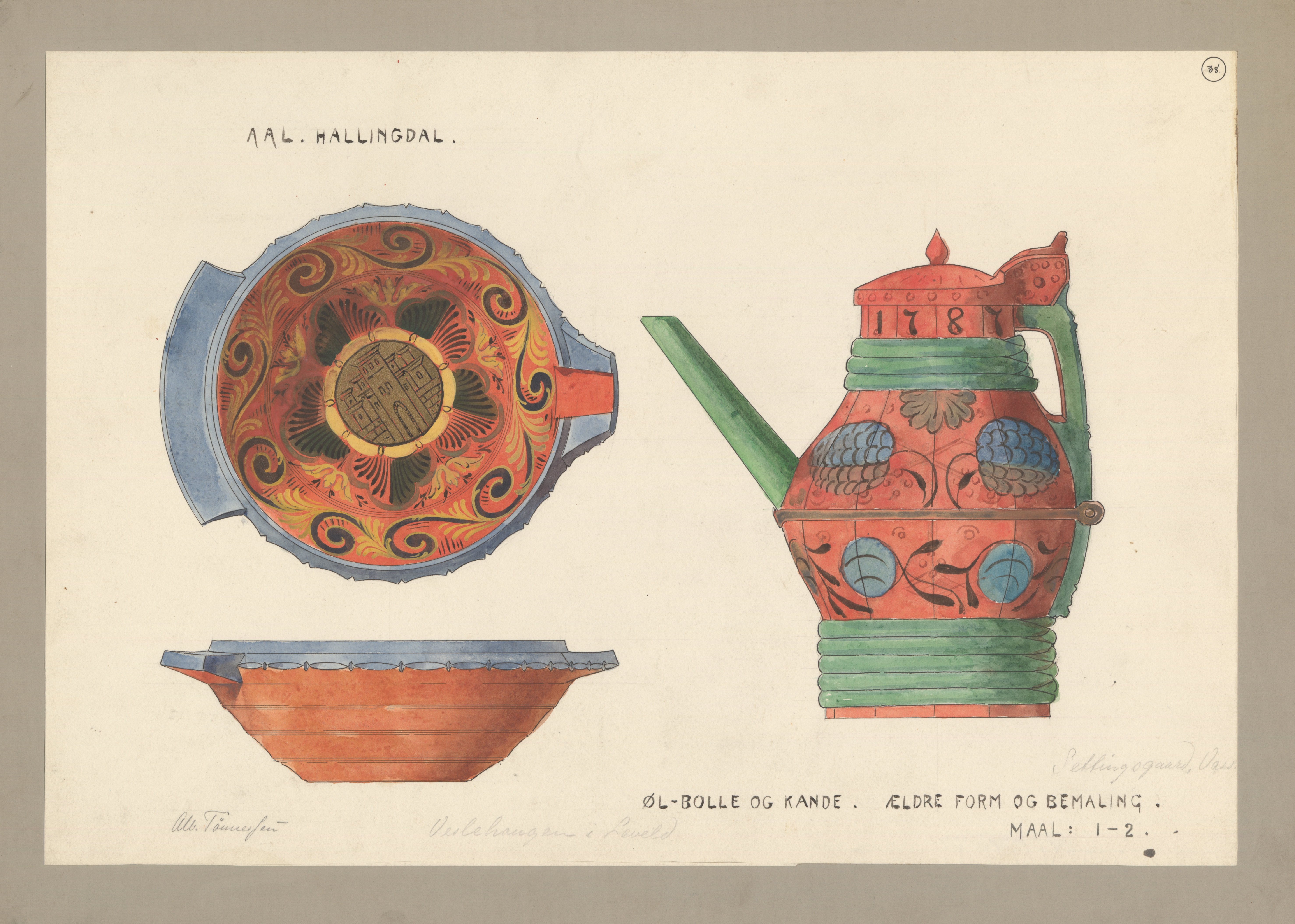 Bildet er hentet fra Riksantikvaren. Veslehaugen i Leveld. Aal i Hallingdal. Øl-bolle og kanne. Eldre form og bemaling. Eier : Sted : Norway, Buskerud, Ål Emneord: GÅRDSANLEGG, AKVARELLER Medium : Akvarell